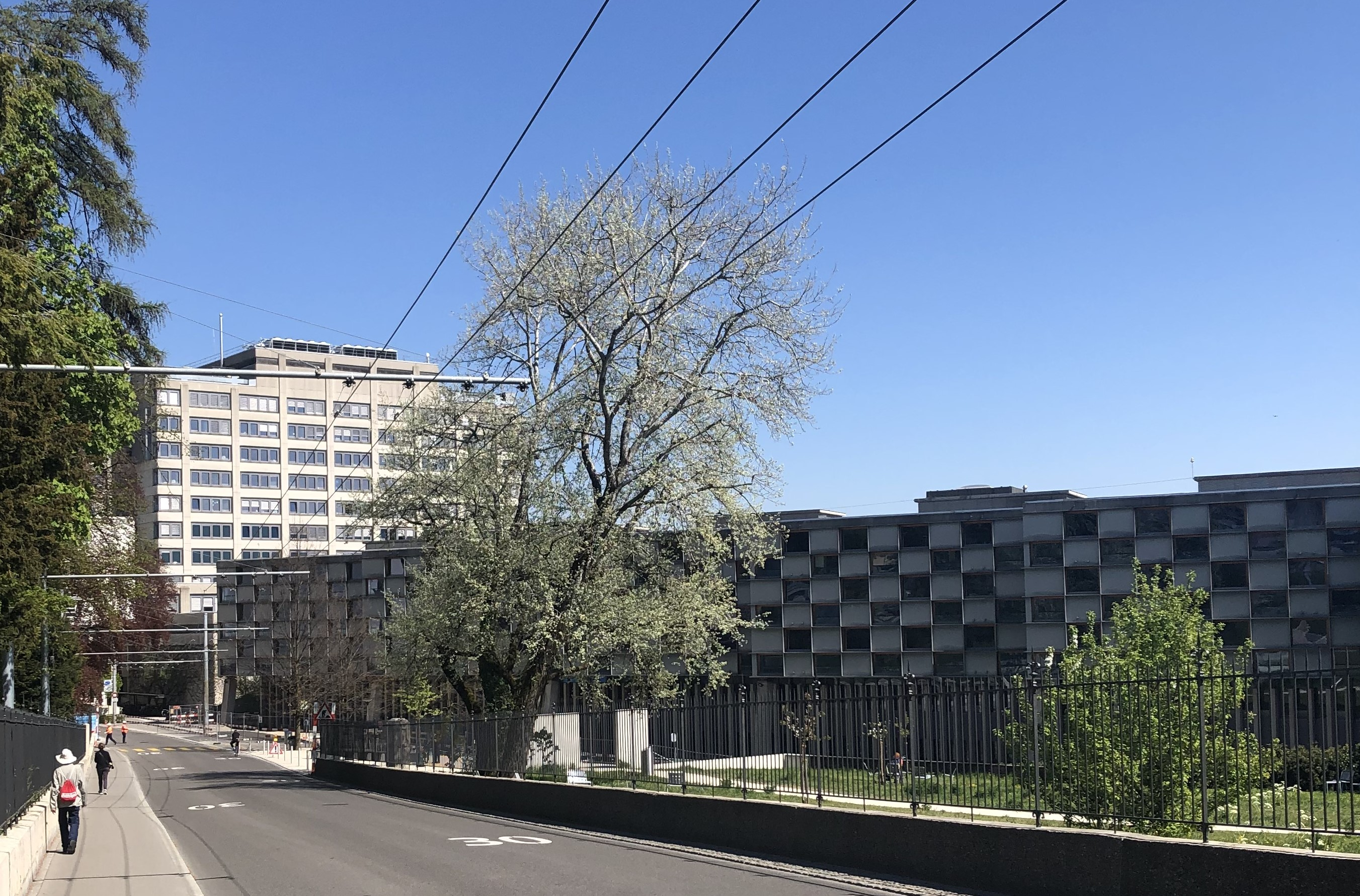 Inselspital Frauenklinik